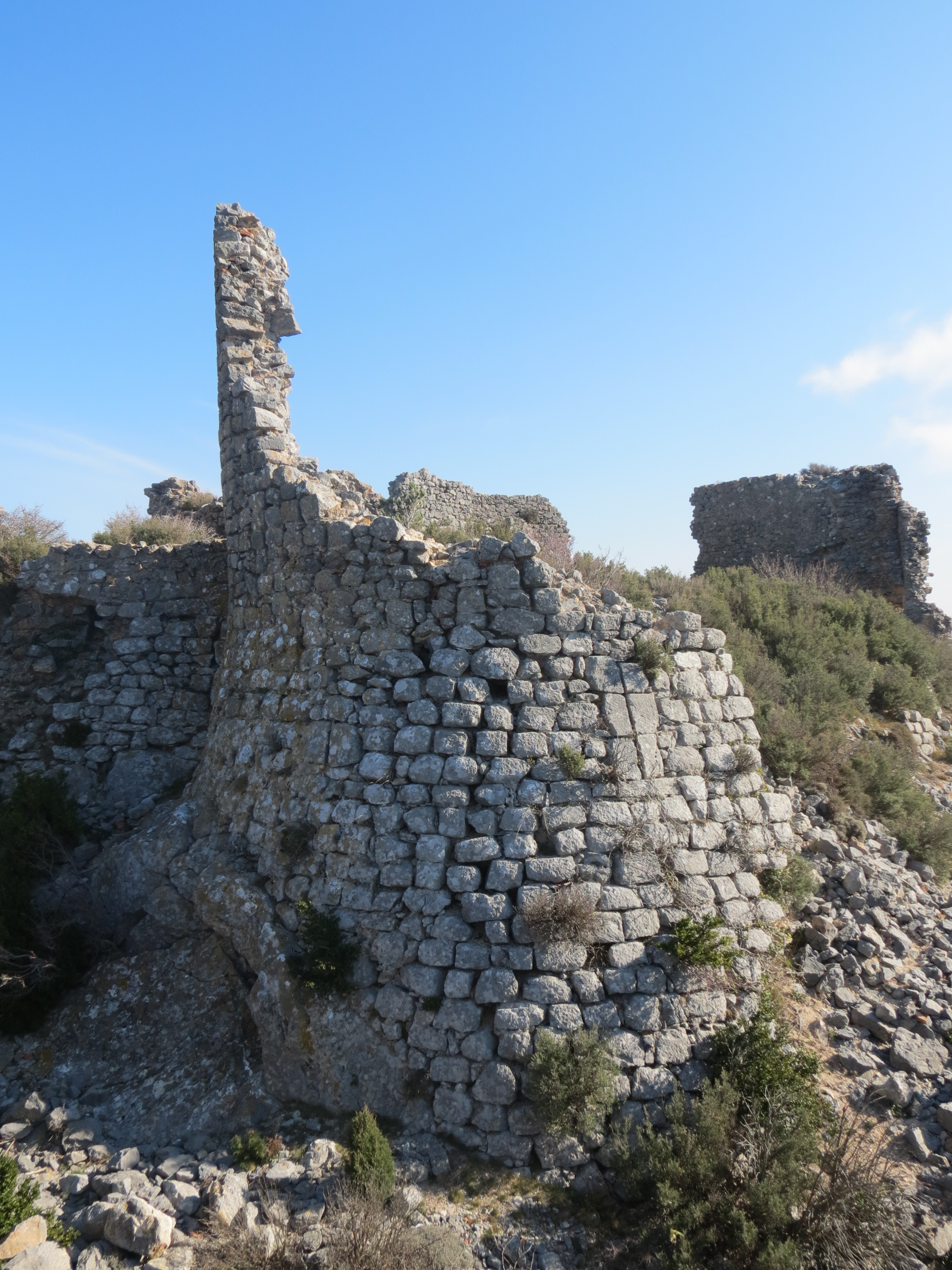 Château de La Salvaterra, Opoul-Périllos, Pyrénée-Orientale, Languedoc-Roussillon, France. - Google Maps - Google Earth